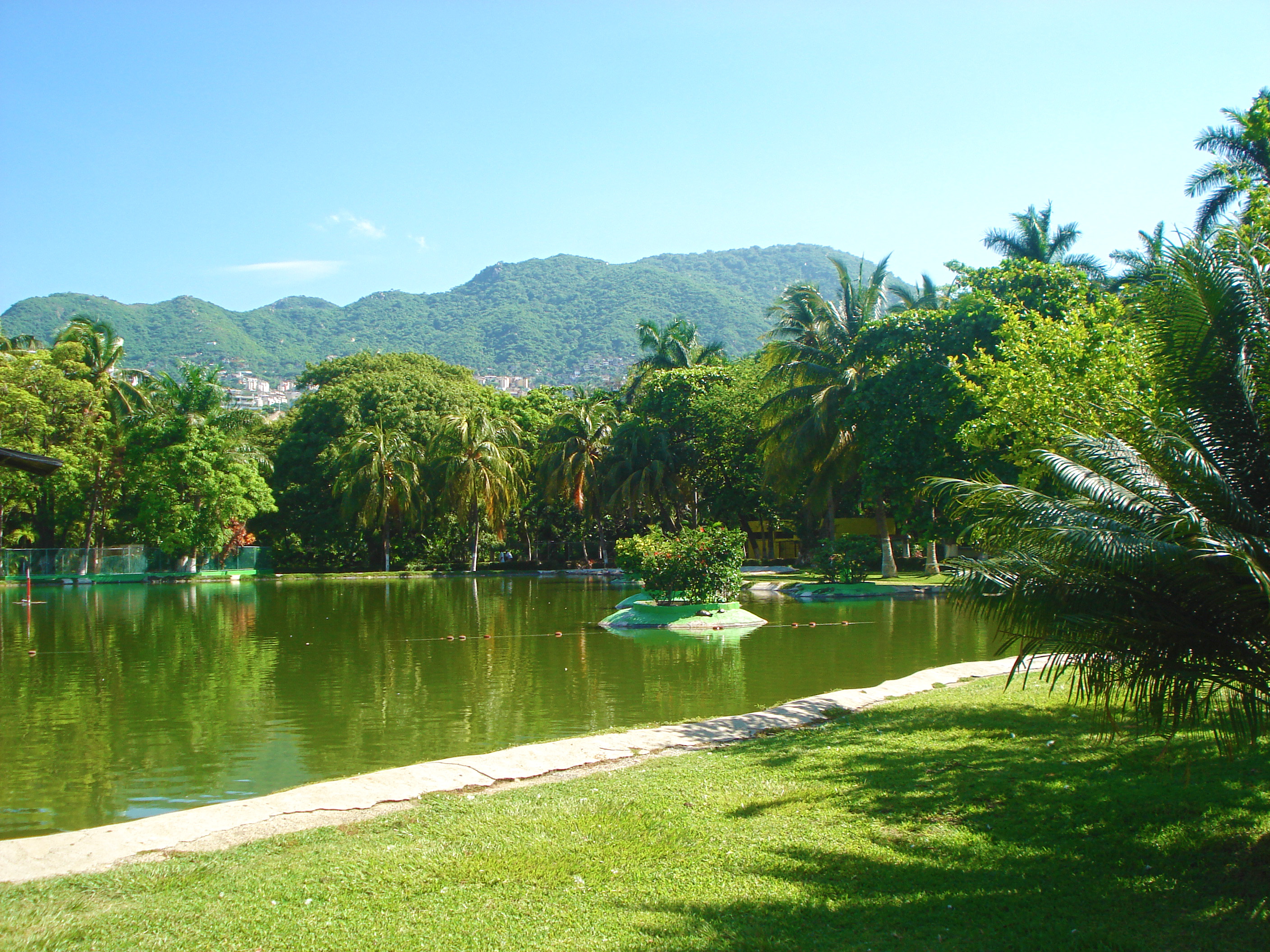 Orilla del lago artificial del Parque Papagayo, en Acapulco, Guerrero, México.